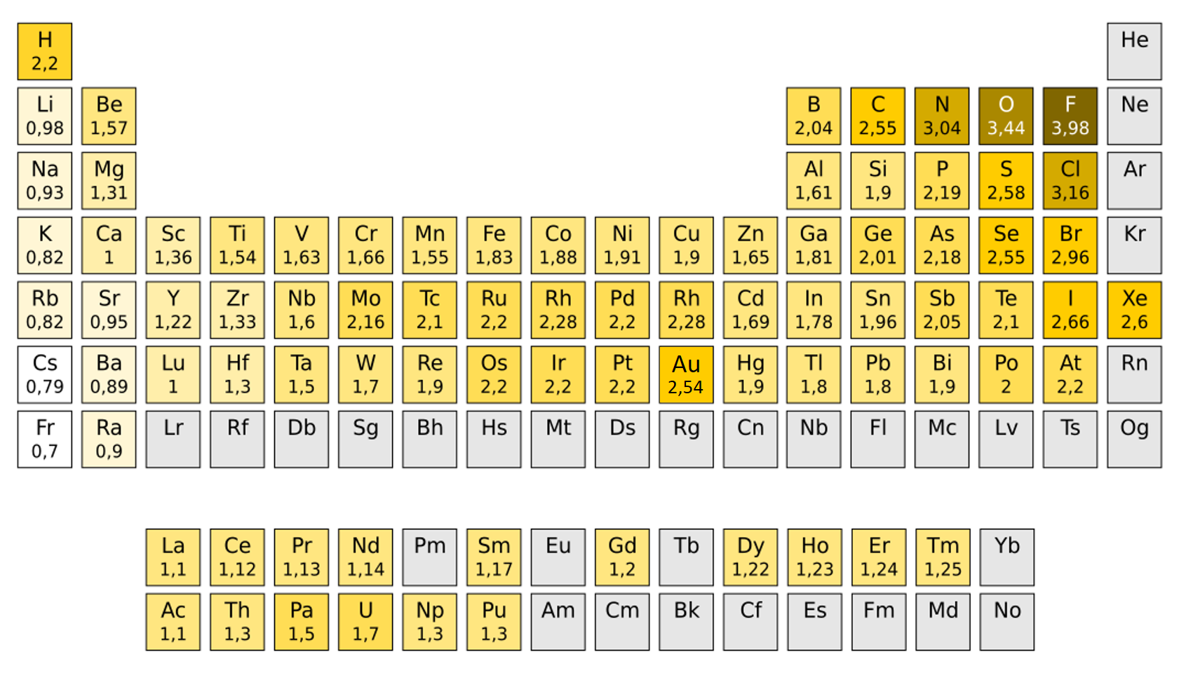 Electronegativitat segon l'escala de Pauling